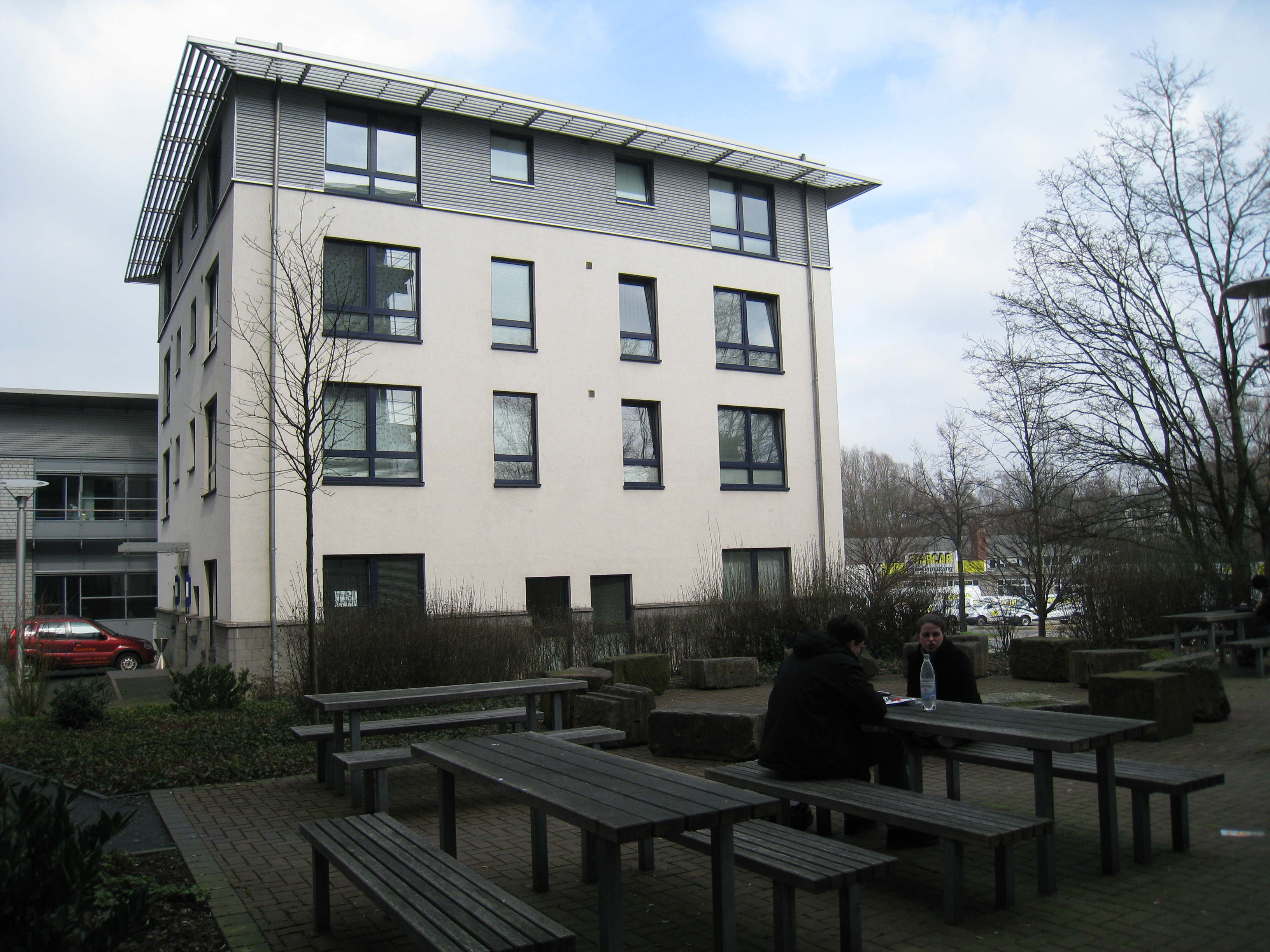 Gästehaus Essen (10)